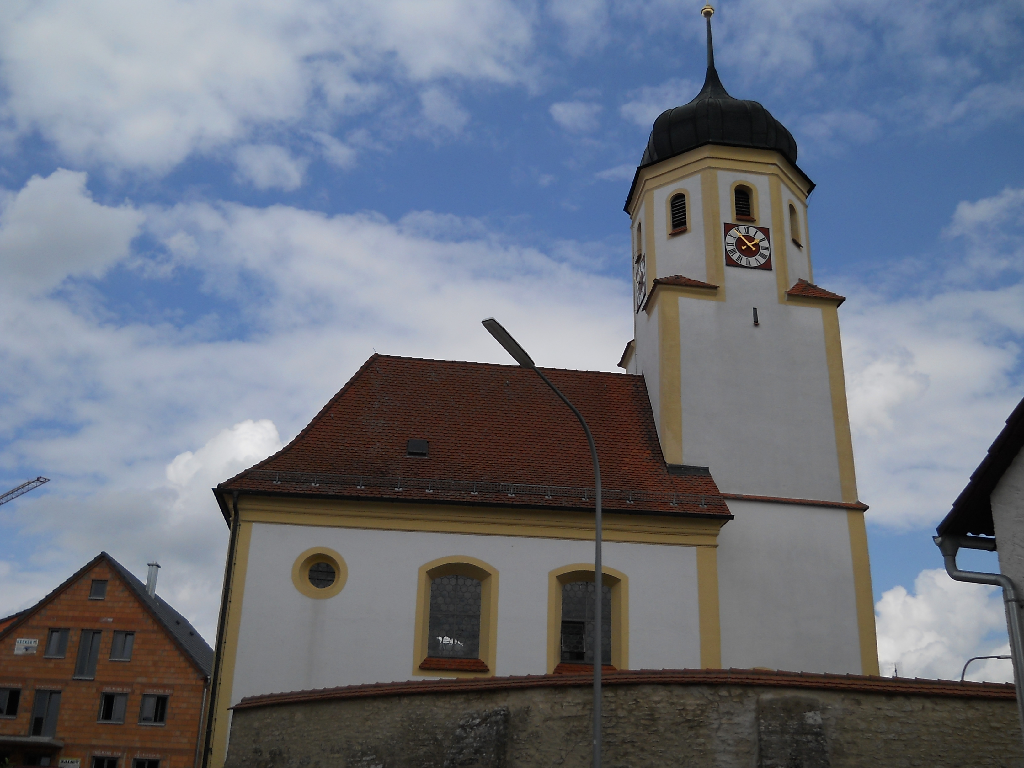 Die katholische Kirche in Raitenbuch, Gemeindeteil von Berching im Landkreis Neumarkt in der Oberpfalz